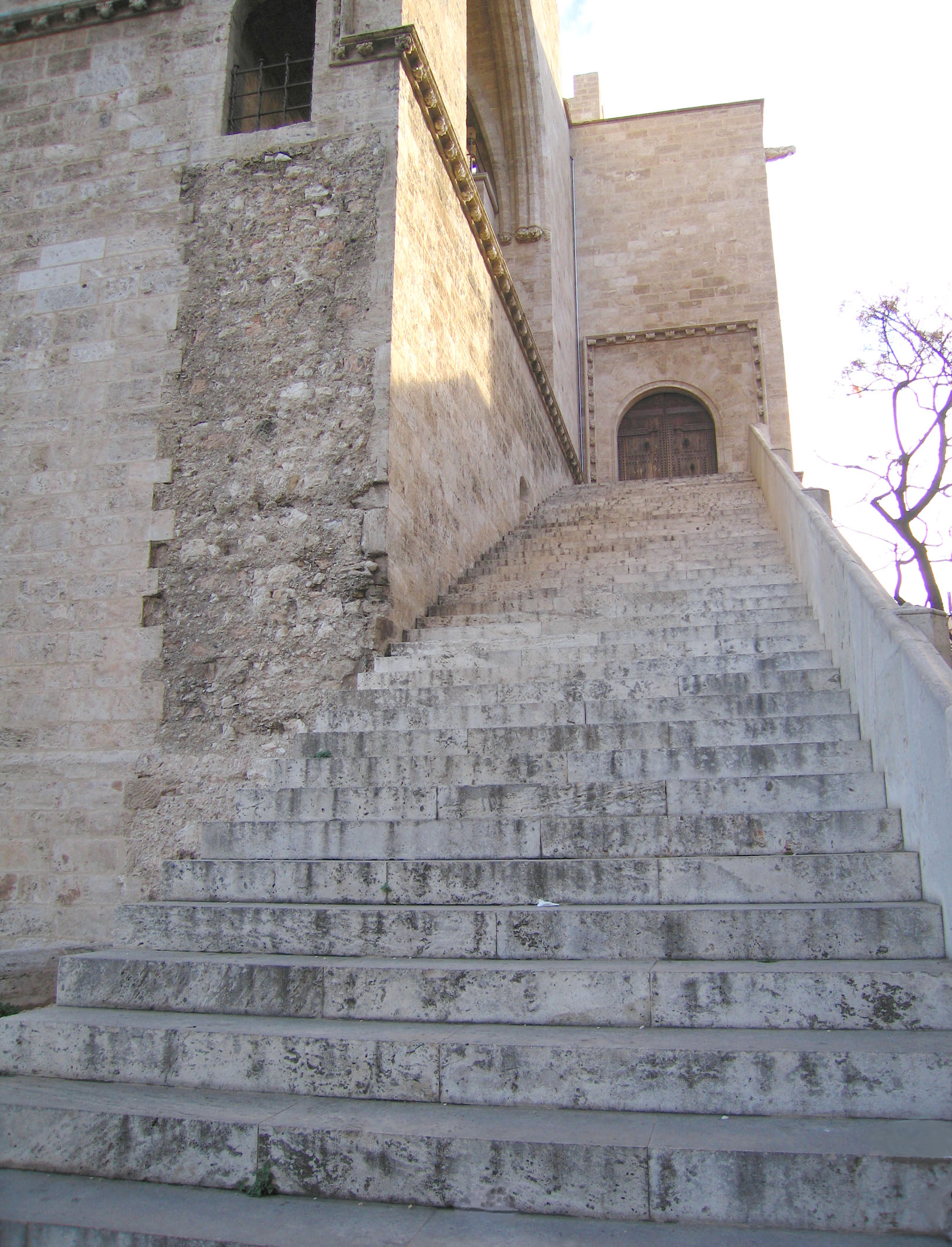 Torres de Serrans (València)